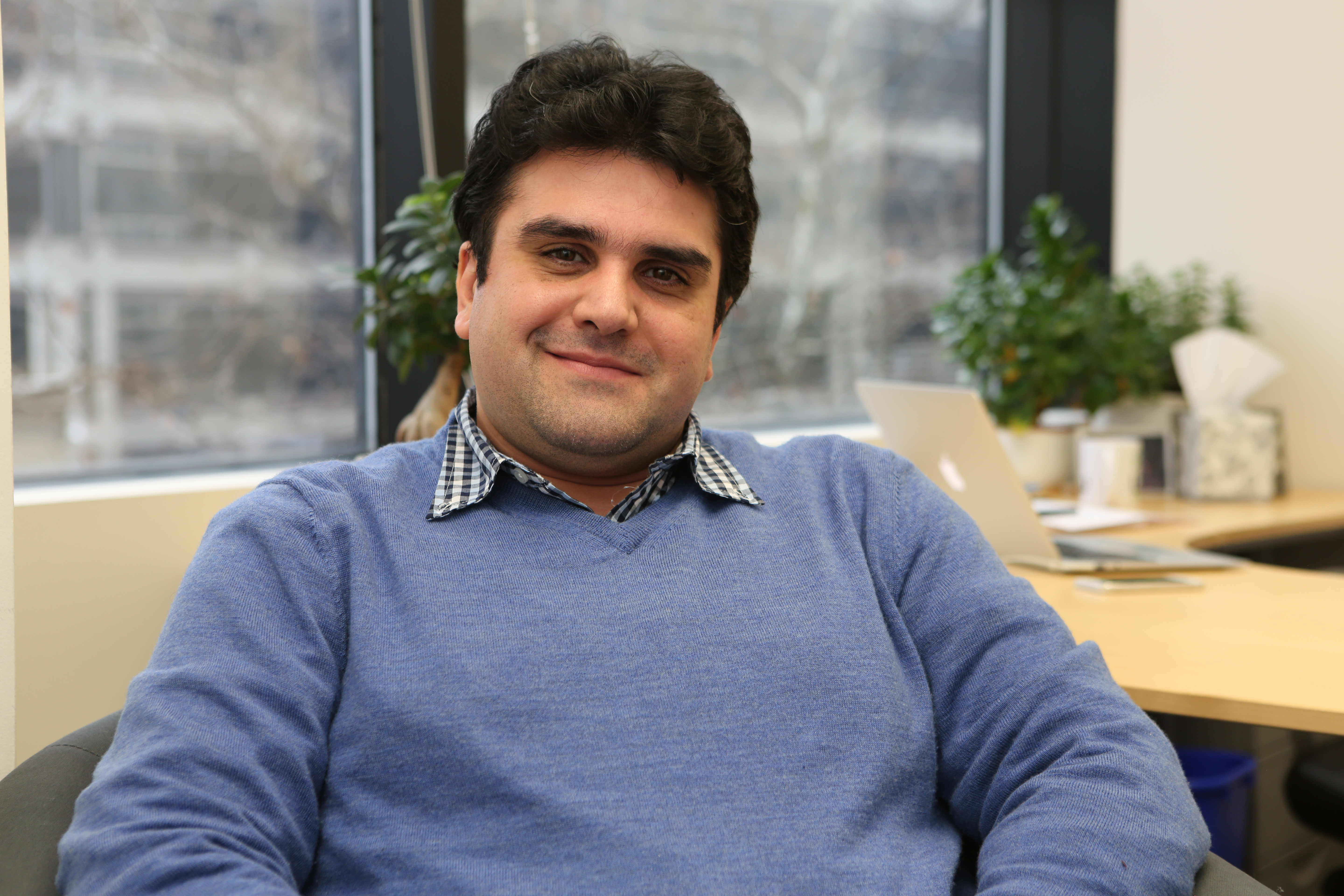 عکس از مهدی عربشاهی دبیر سابق تشکیلات دفتر تحکیم وحدت و دبیر کنونی همبستگی جمهوری‌خواهان ایران است.